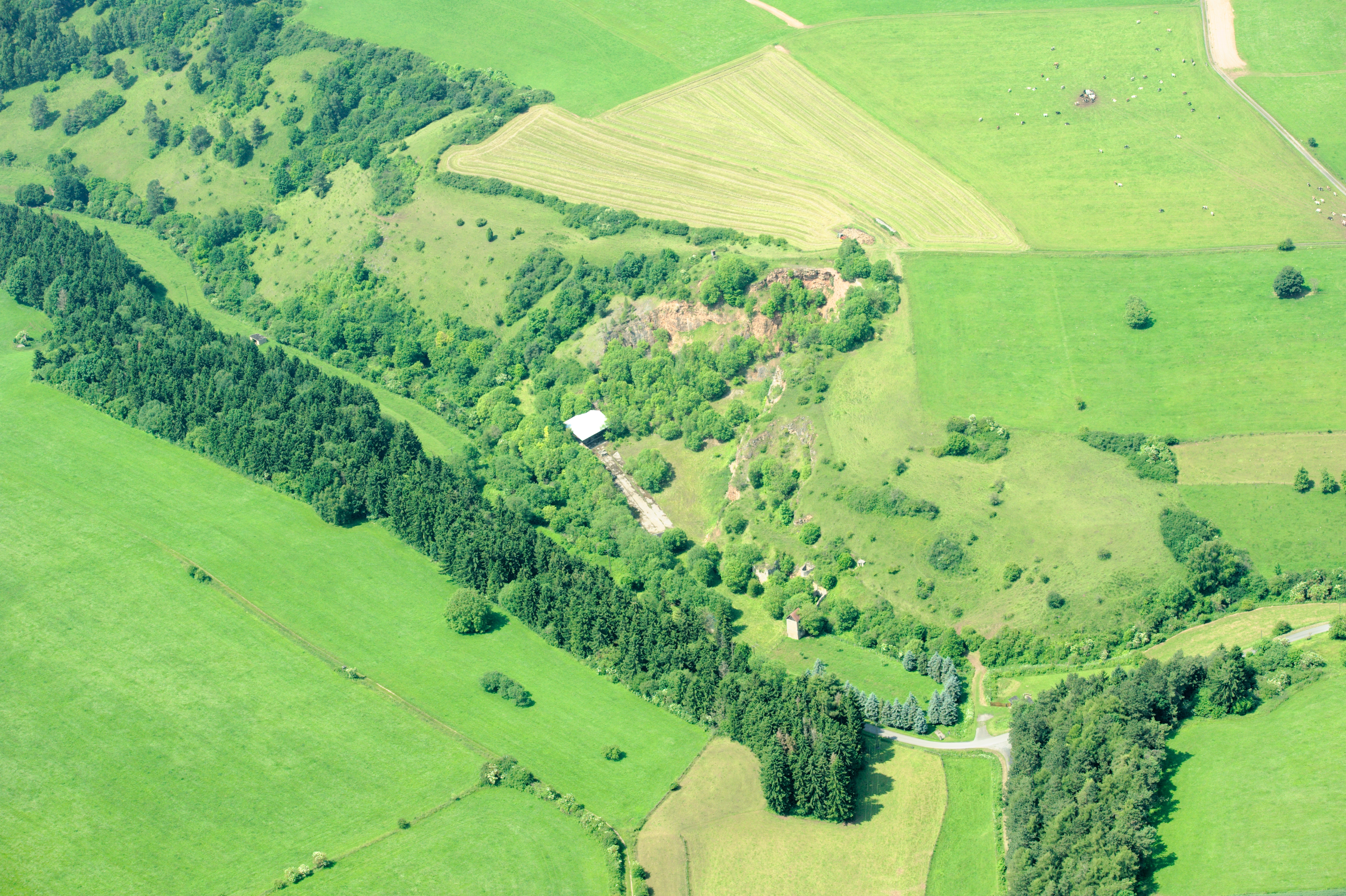 Fotoflug Sauerland-Ost: Östlicher Teil des Naturschutzgebietes Wulsenberg (HSK-028) westlich von Marsberg-Erlinghausen. The making of this document was supported by the Community-Budget of Wikimedia Germany.